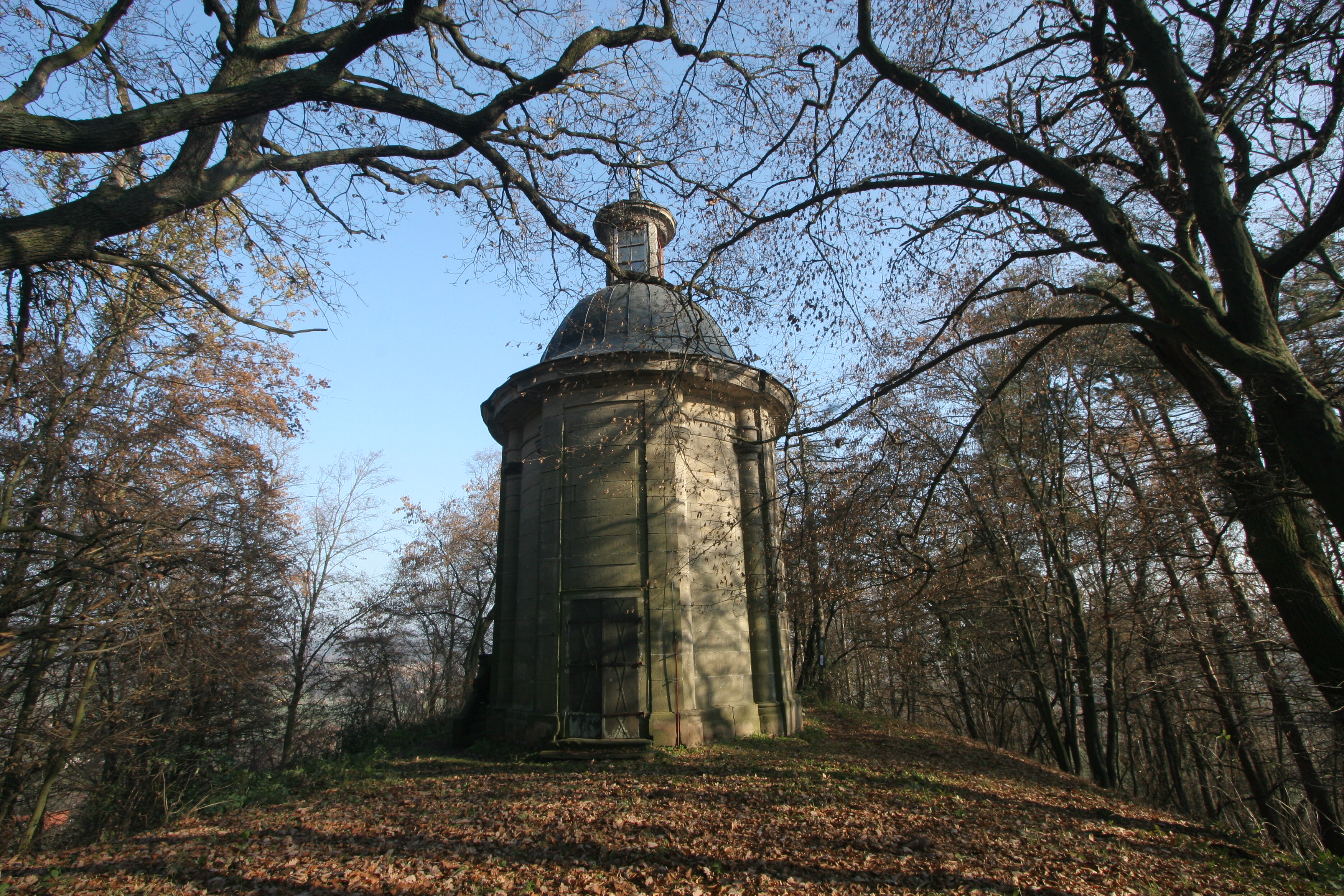 Kaple sv. Anny (Ostružno), na kopci Z vsi, Ostružno